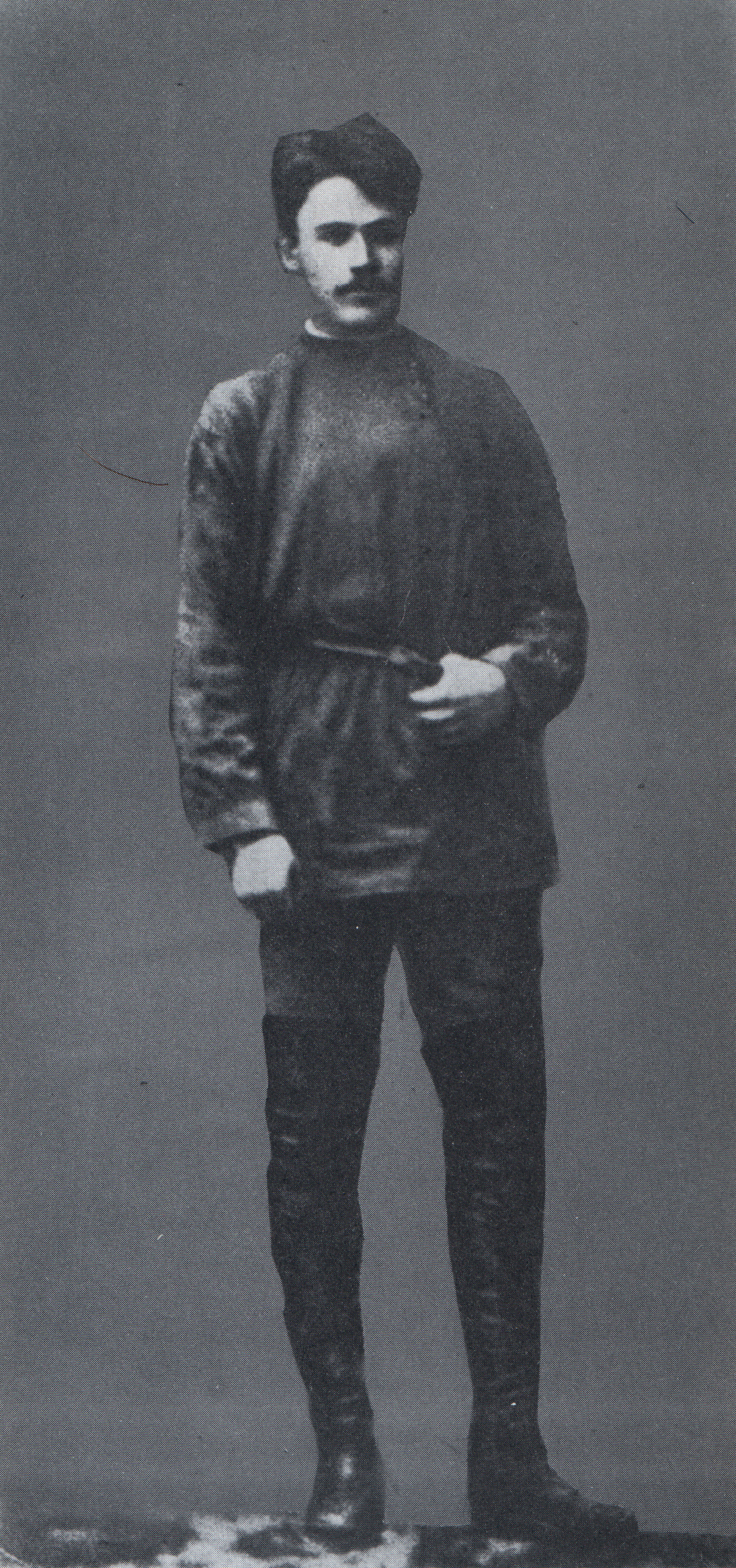 El revolucionario ruso Georgi Plejánov, de joven, en fecha desconocida.